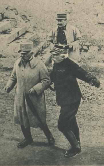 Les généraux NNivelle et Balfourier.